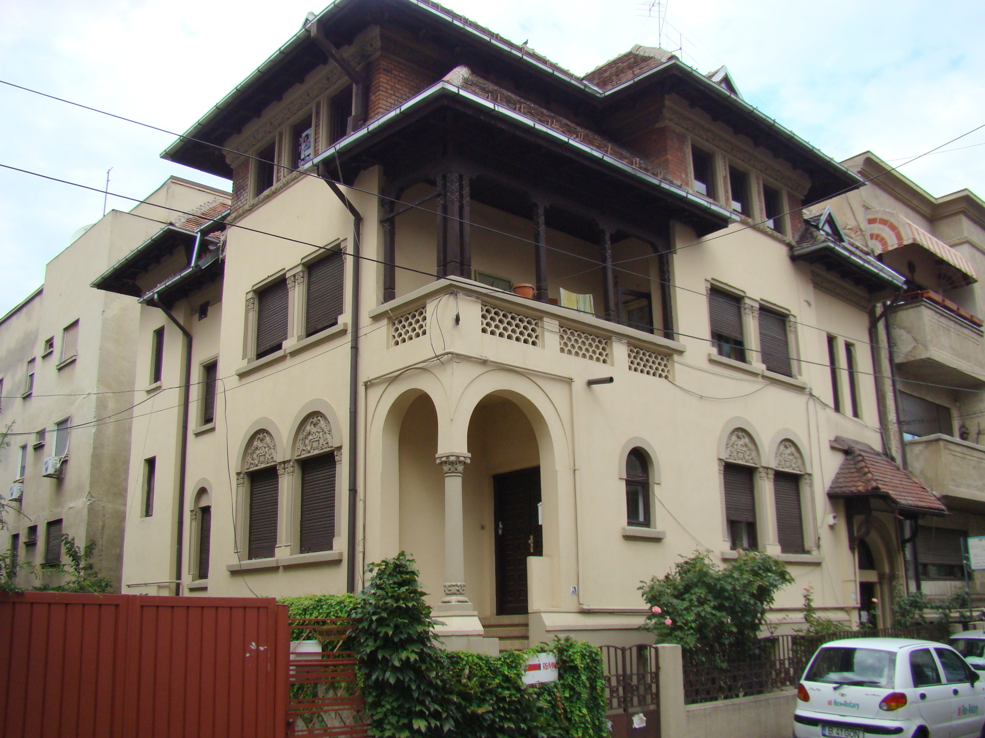 Clădire monument istoric, str. Tokio, nr.3